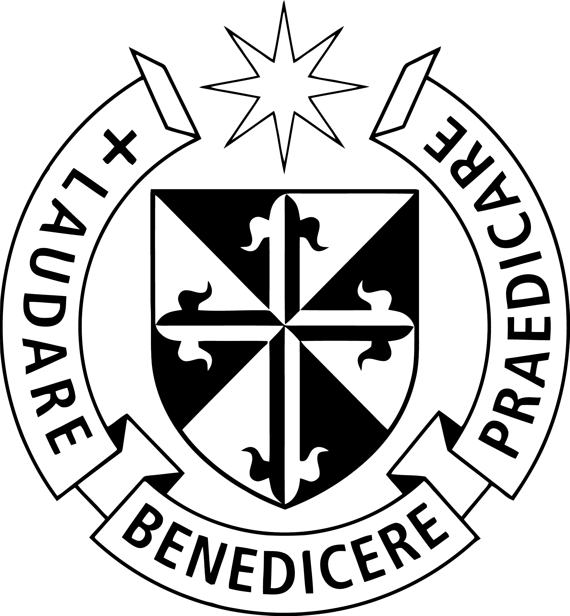 Orden de Predicadores